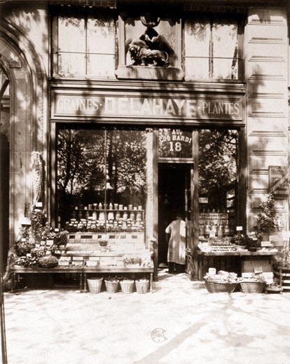 Au Coq Hardi, 18 quai de la Mégisserie Tirage entre 1902 et 1913 d'après négatif de 1902 Série "Art dans le vieux Paris"